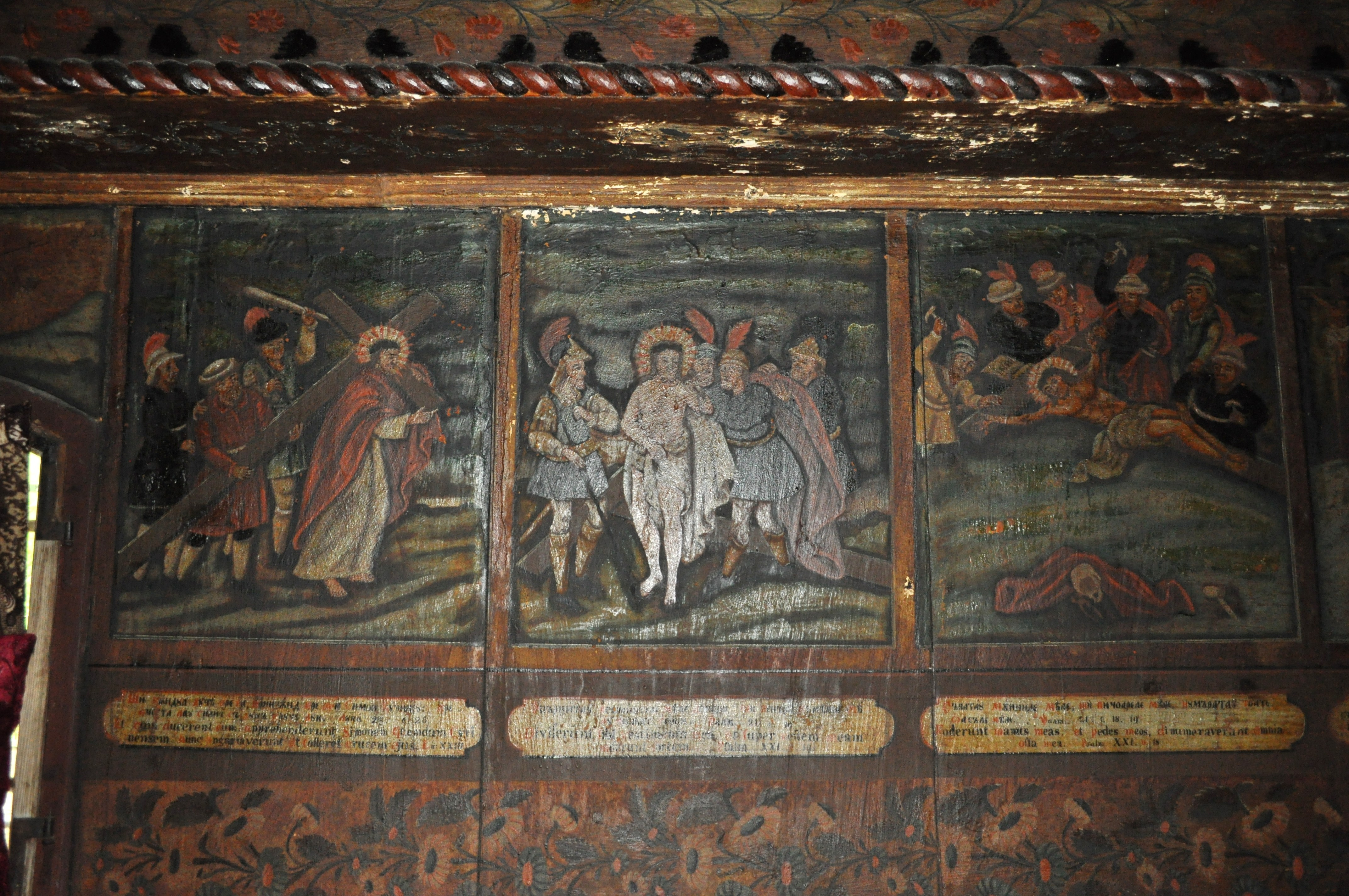 Biserica „Sf. Arhangheli Mihail și Gavriil” din Răstoci”, județul Sălaj